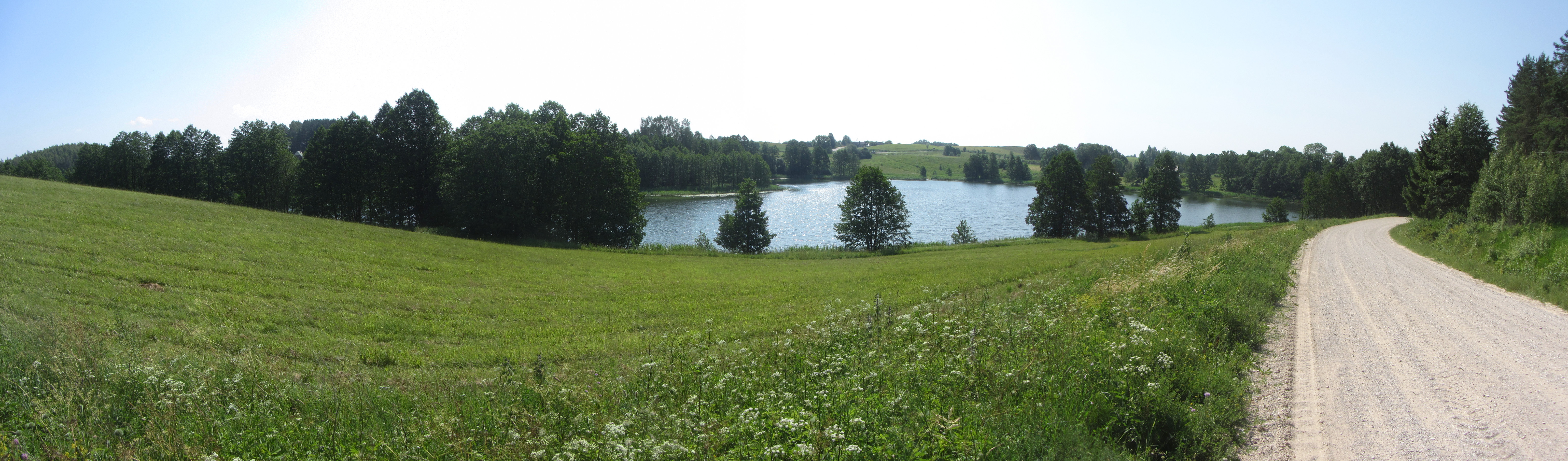 Šlavantų sen., Lithuania